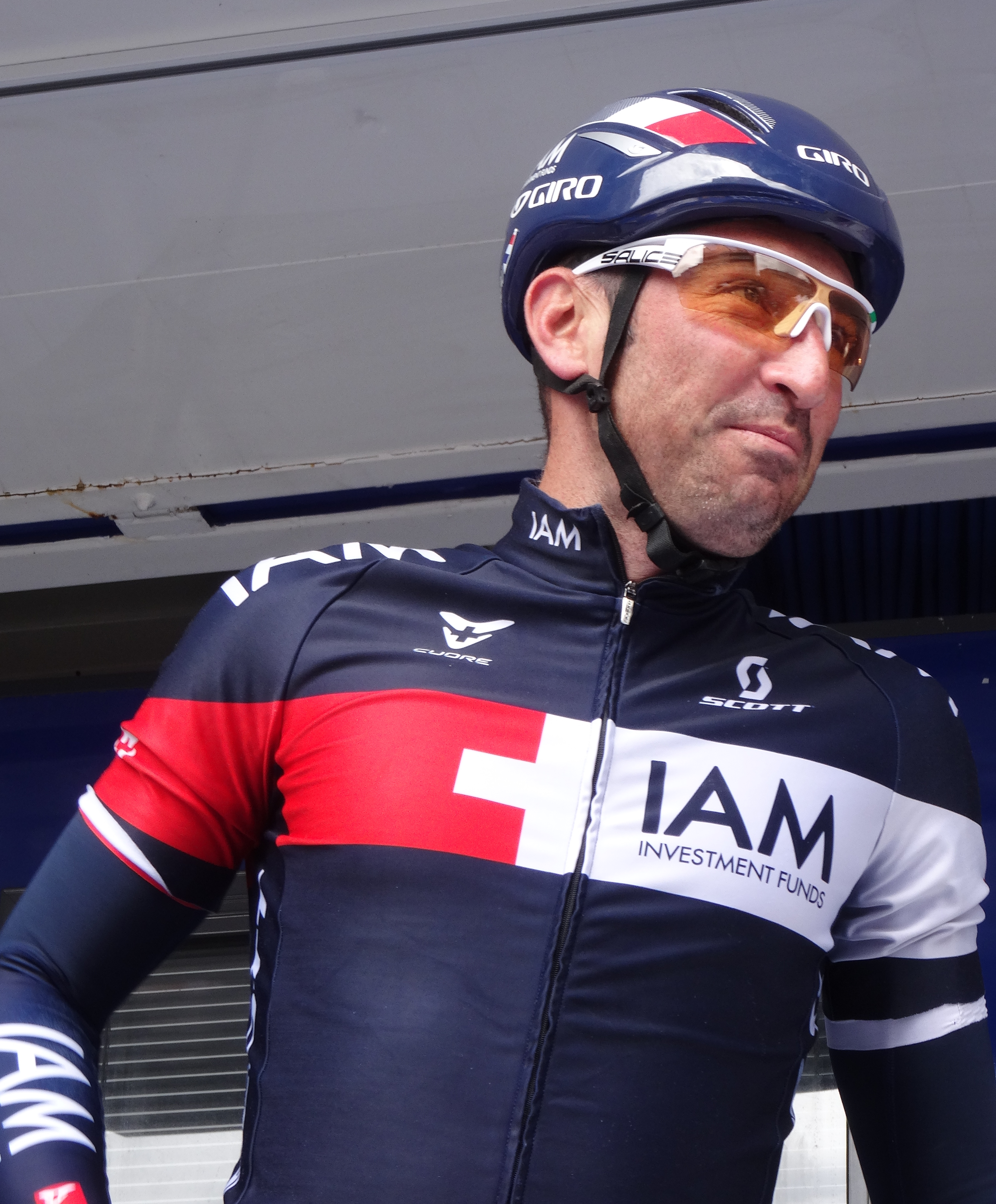 Reportage photographique réalisé le mercredi 7 mai 2014 au départ de la première étape de l'édition 2014 des Quatre jours de Dunkerque à Dunkerque, Nord, Nord-Pas-de-Calais, France. Depicted person: Jérôme Pineau Depicted team: IAM